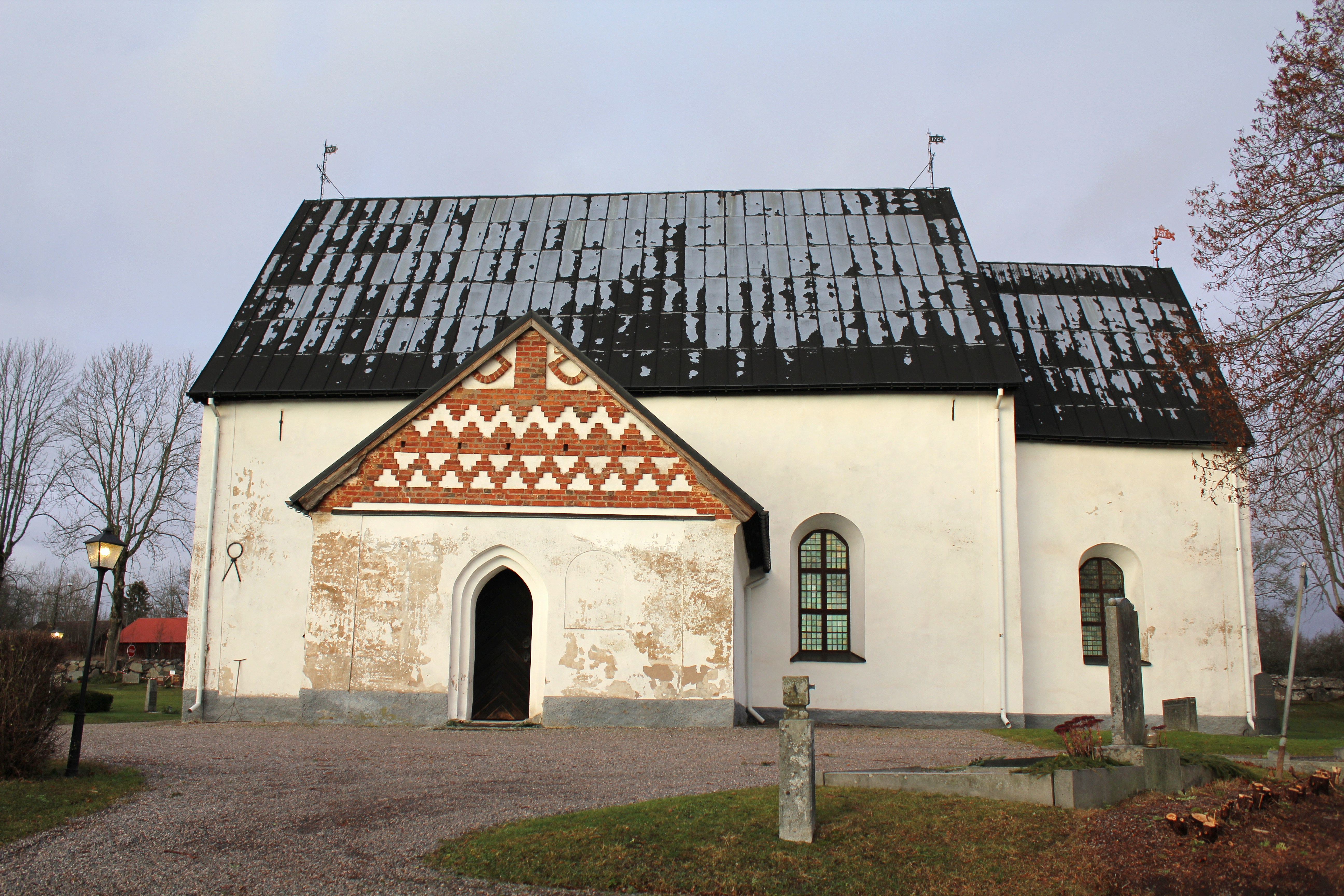 Estuna kyrka i Norrtälje kommun.